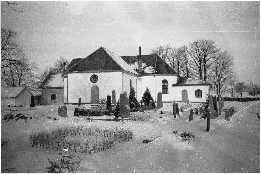 Kyrkan mot söder. Kategori: (01) ExteriörerKyrkan mot söder.